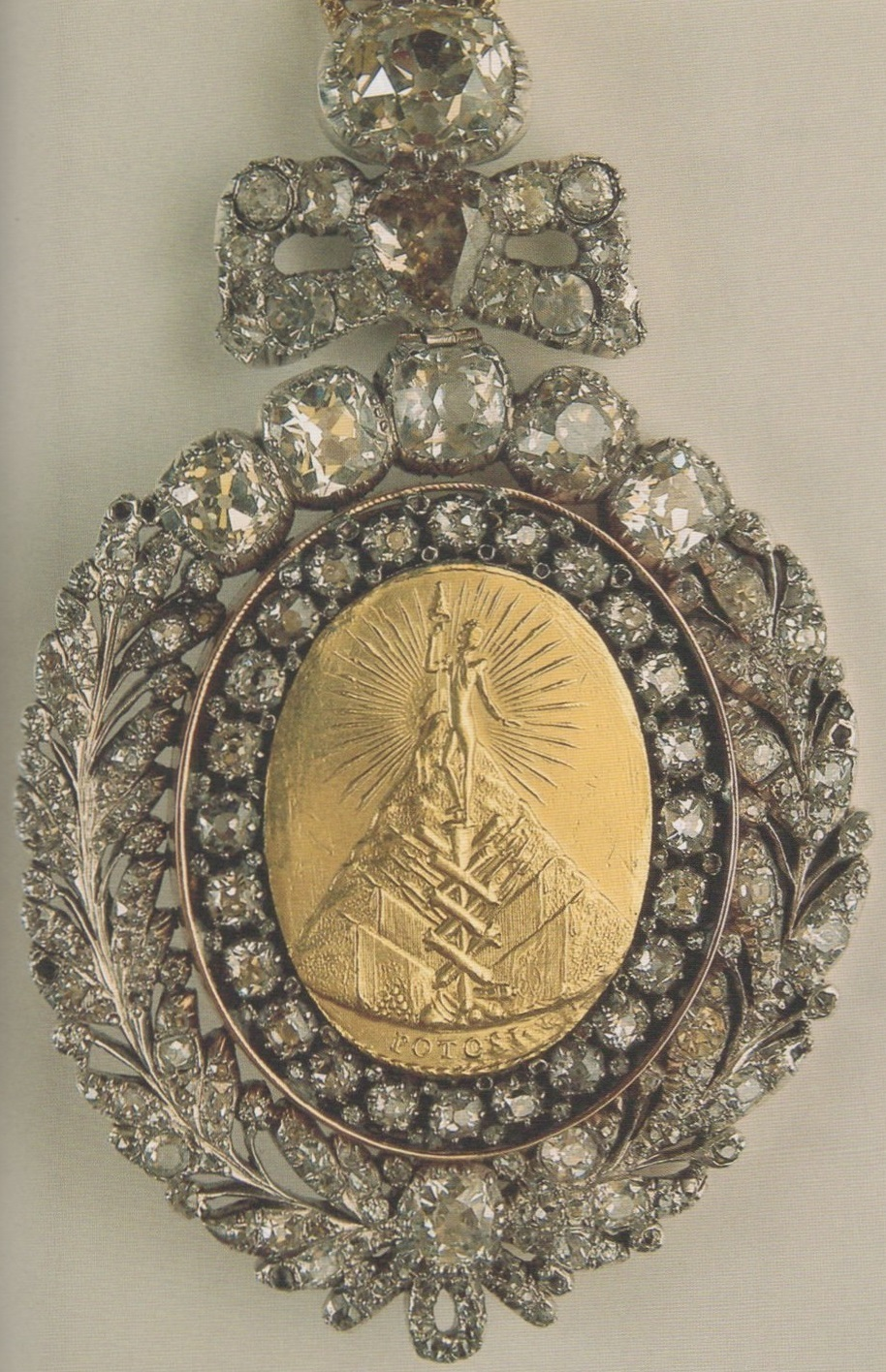 La medalla presidencial de Bolivia, herencia del Libertador Simón Bolívar